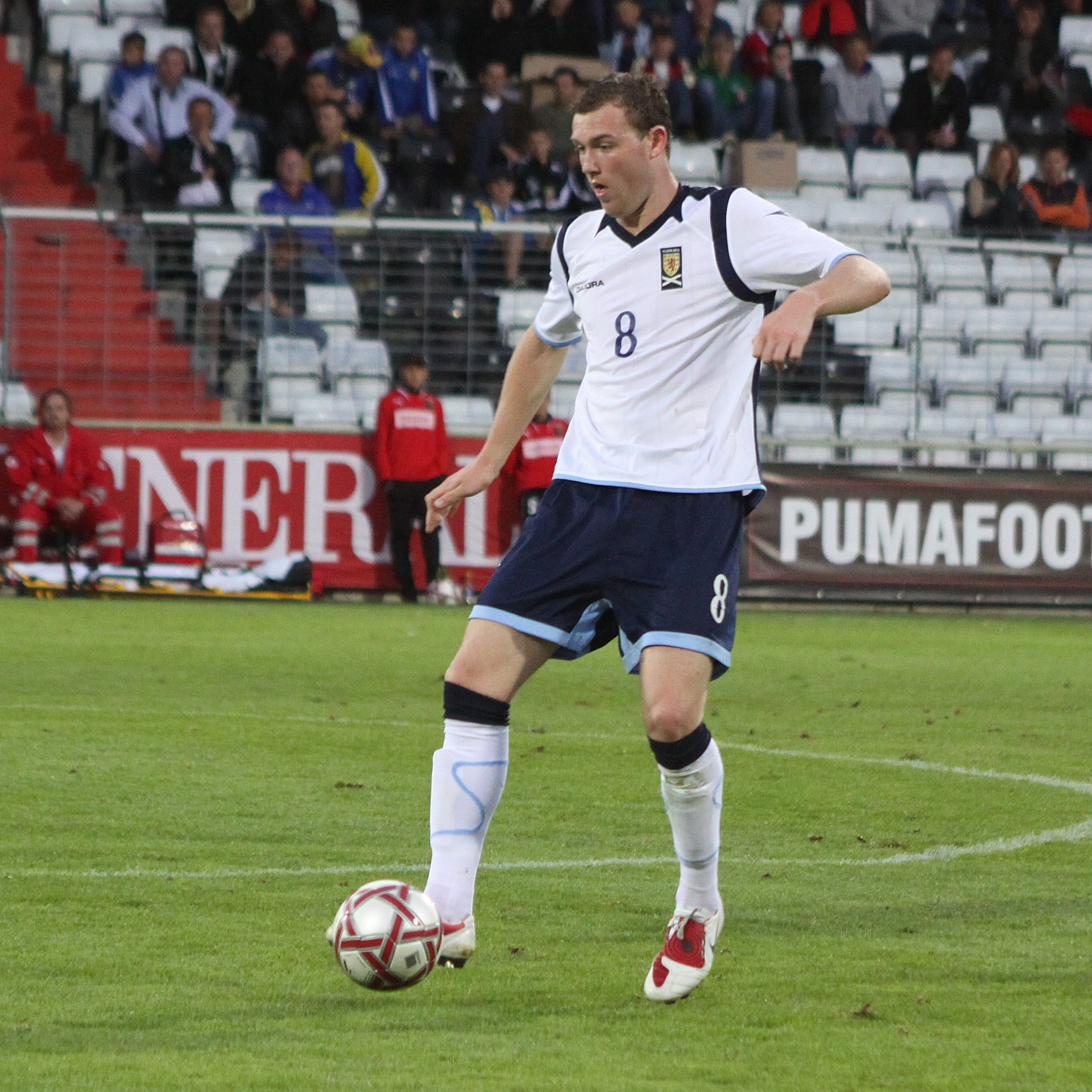 Kevin McDonald (FC Burnley) - Schottische Fußballnationalmannschaft (U-21-Männer) Kevin McDonald (Burnley F.C.) - Scotland national under-21 football team — (3)